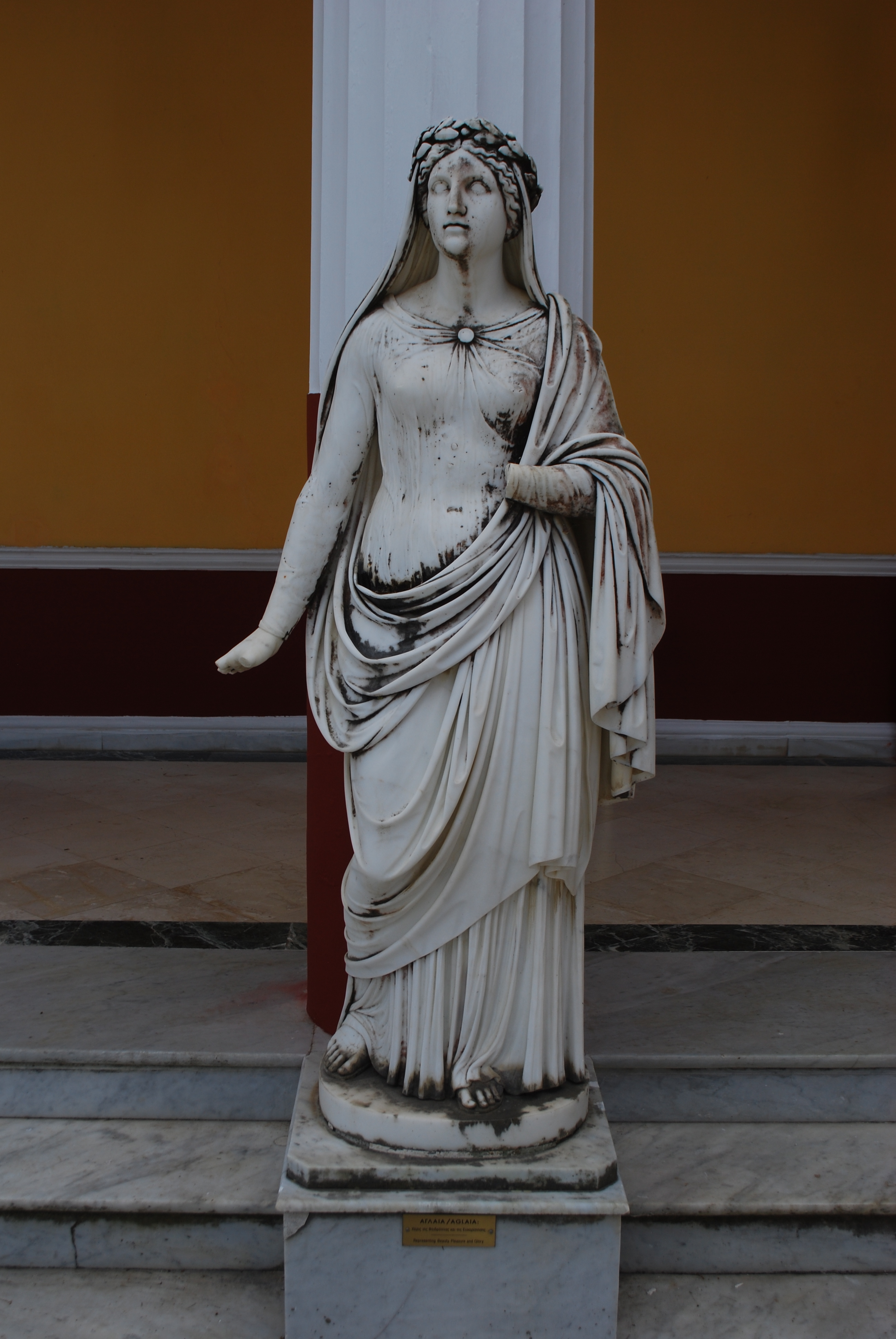 Vue d'une sculpture à l'Achilleion de Corfou.